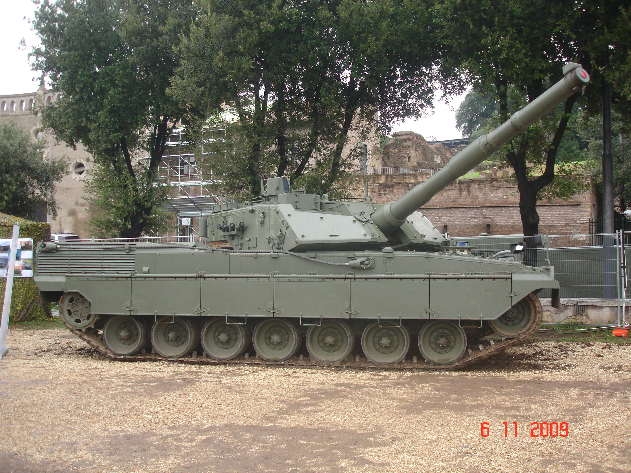 Carro Ariete a Roma esposto al circo massimo.